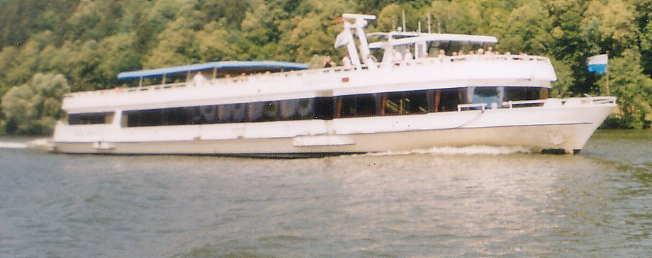 Wurm und Köck Donauausflugsschiff